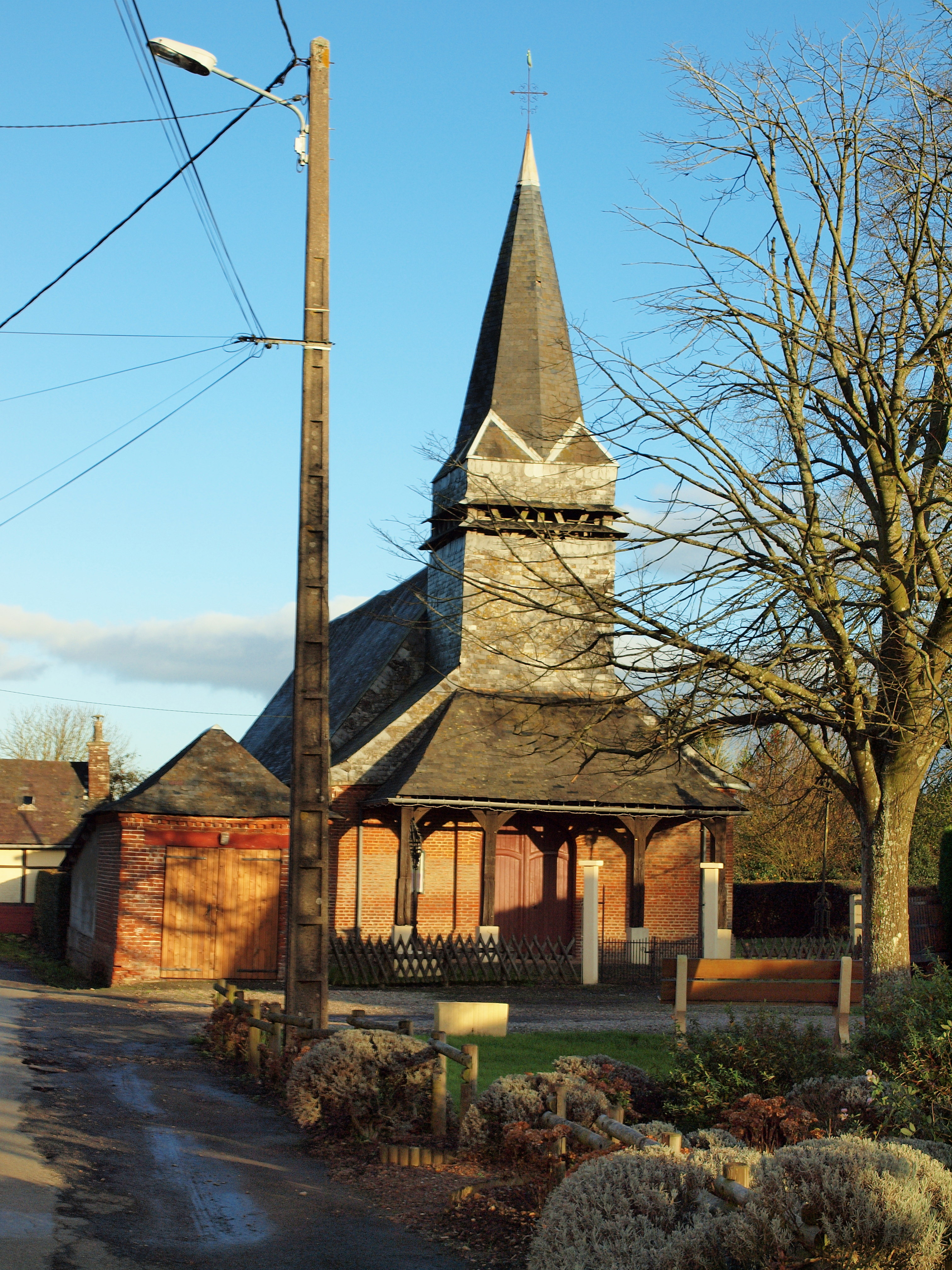 Abancourt (Oise, France)